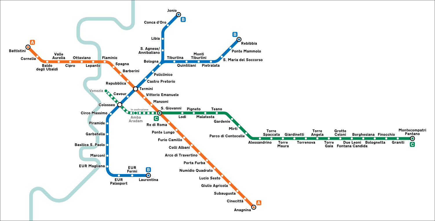 Mappa della metropolitana di Roma.